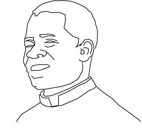 Portrait du premier président de la République du Congo Fulbert Youlou